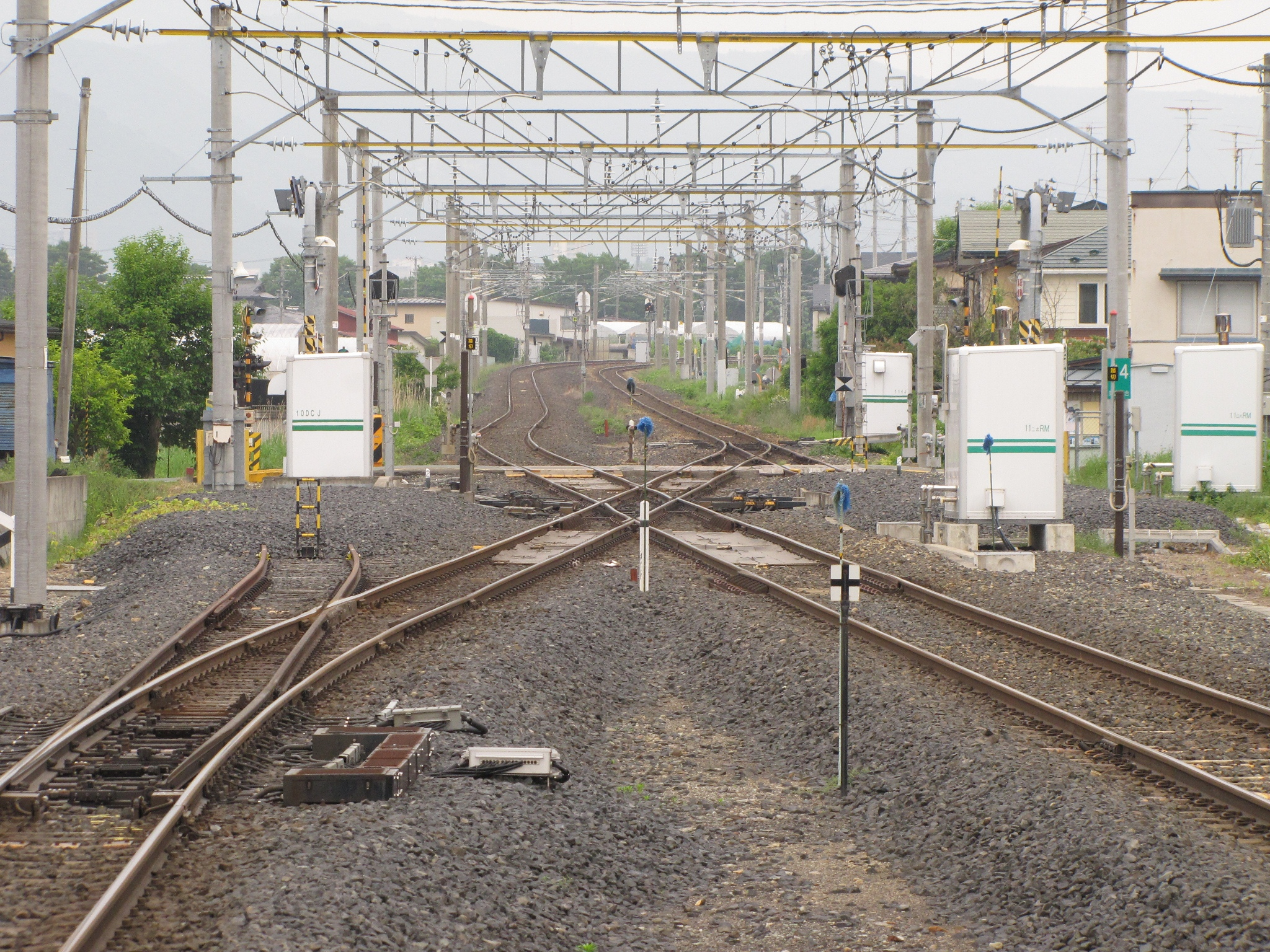 羽前千歳駅 奥羽本線と仙山線の平面交差